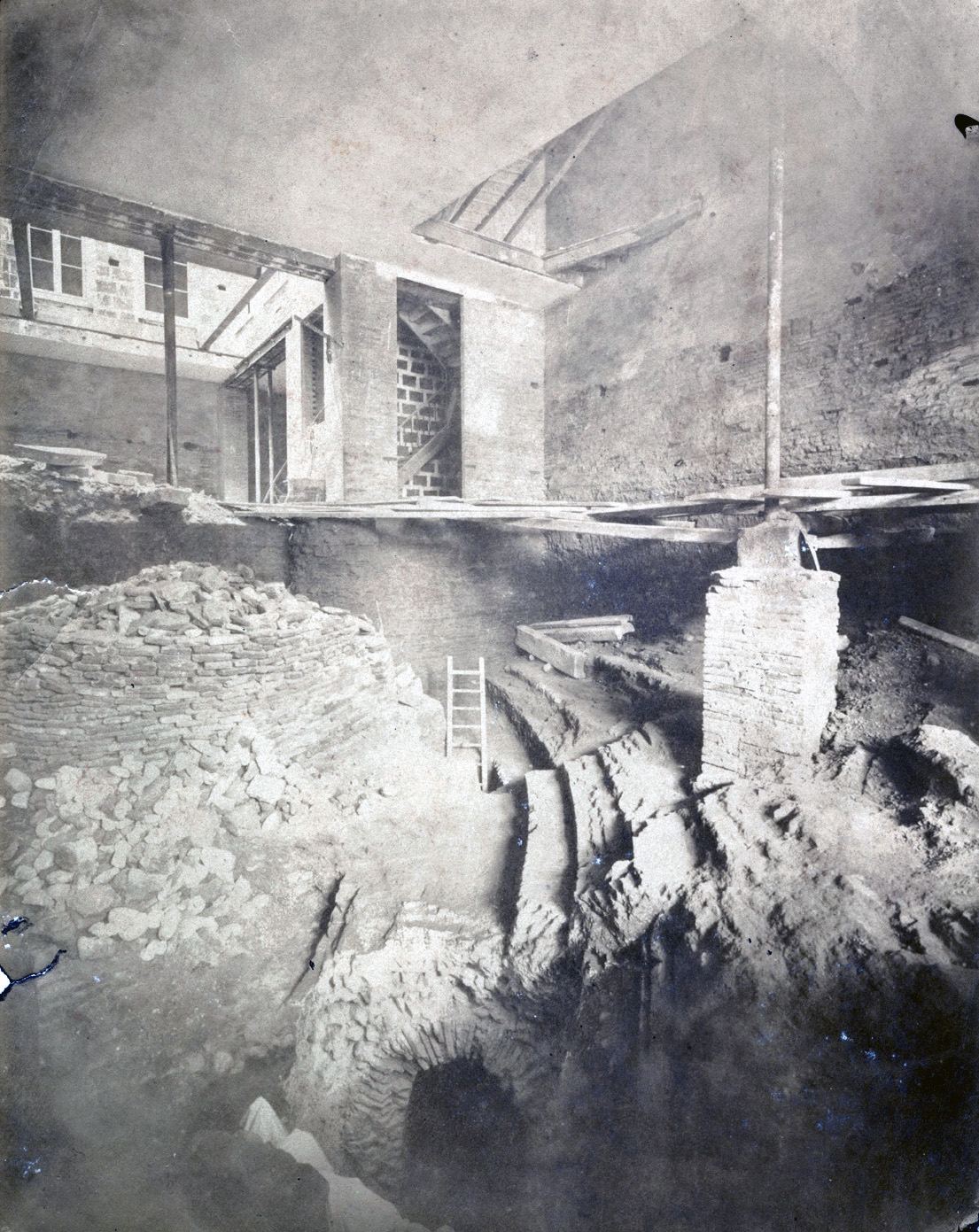 Gradins du théâtre antique sous la maison Jèze (aujourd'hui au n°1 de la rue de Metz)